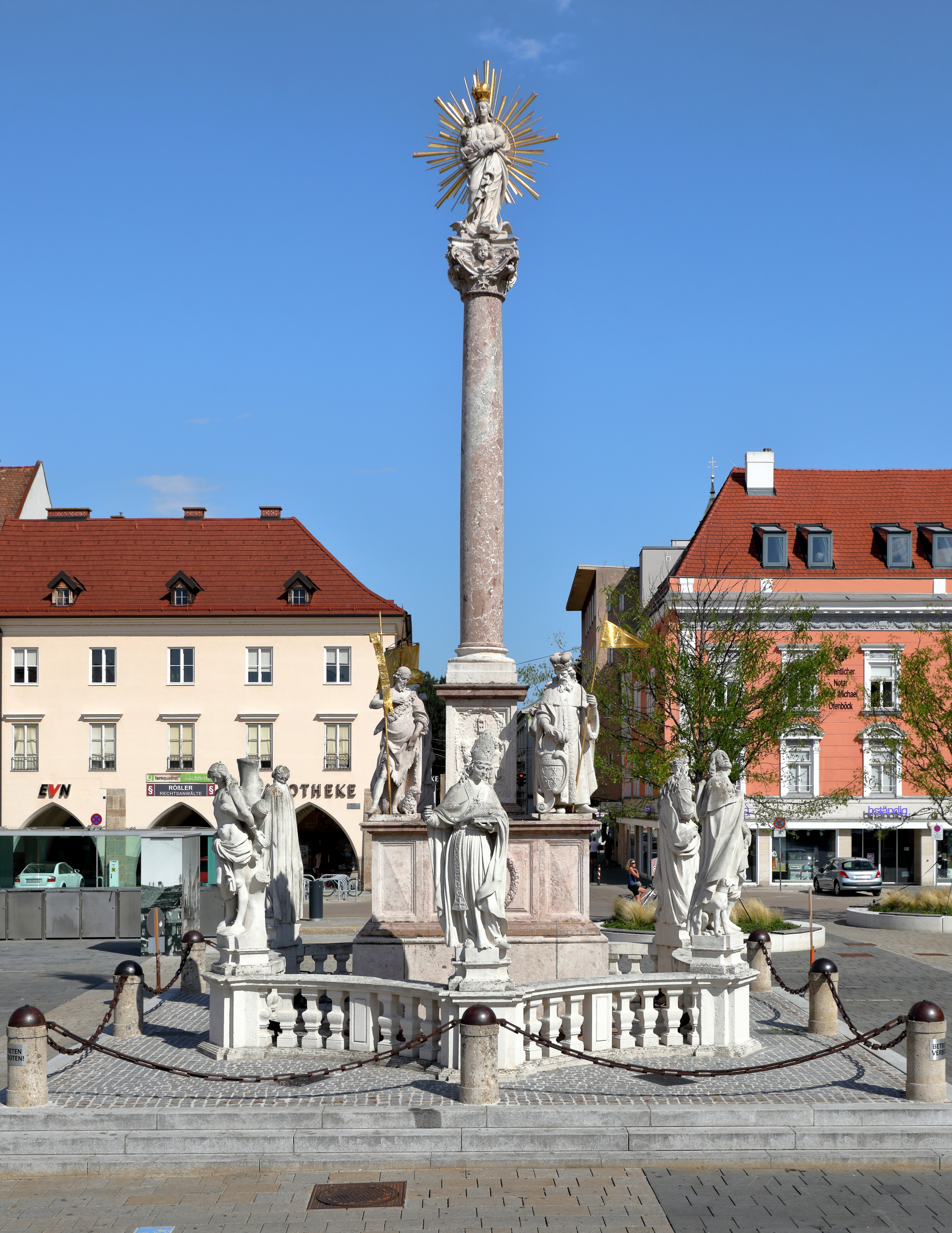 Westansicht der Mariensäule am Hauptplatz der niederösterreichischen Bezirkshauptstadt Wiener Neustadt.Die Mariensäule wurde vom Wiener Neustädter Bischofs Leopold Graf Kollonitsch gestiftet. Sie soll an die Hochzeiten zweier Schwestern Kaiser Leopolds I. 1678 in der St. Georgs-Kirche der Wiener Neustädter Burg erinnern. Die sechseckige Balustrade mit überlebensgroßen Statuen wurde 1714 von Bischof Franz Anton Graf von Puchheim gestiftet. Auf dem Sockel sind die 4 Heiligen Johannes d. Täufer, Florian, Antonius von Padua und Leopold dargestellt und bei der Balustrade die 6 Pestheiligen Sebastian, Franz Xaver, Karl Borromäus, Rosalia, Rochus und Benno.